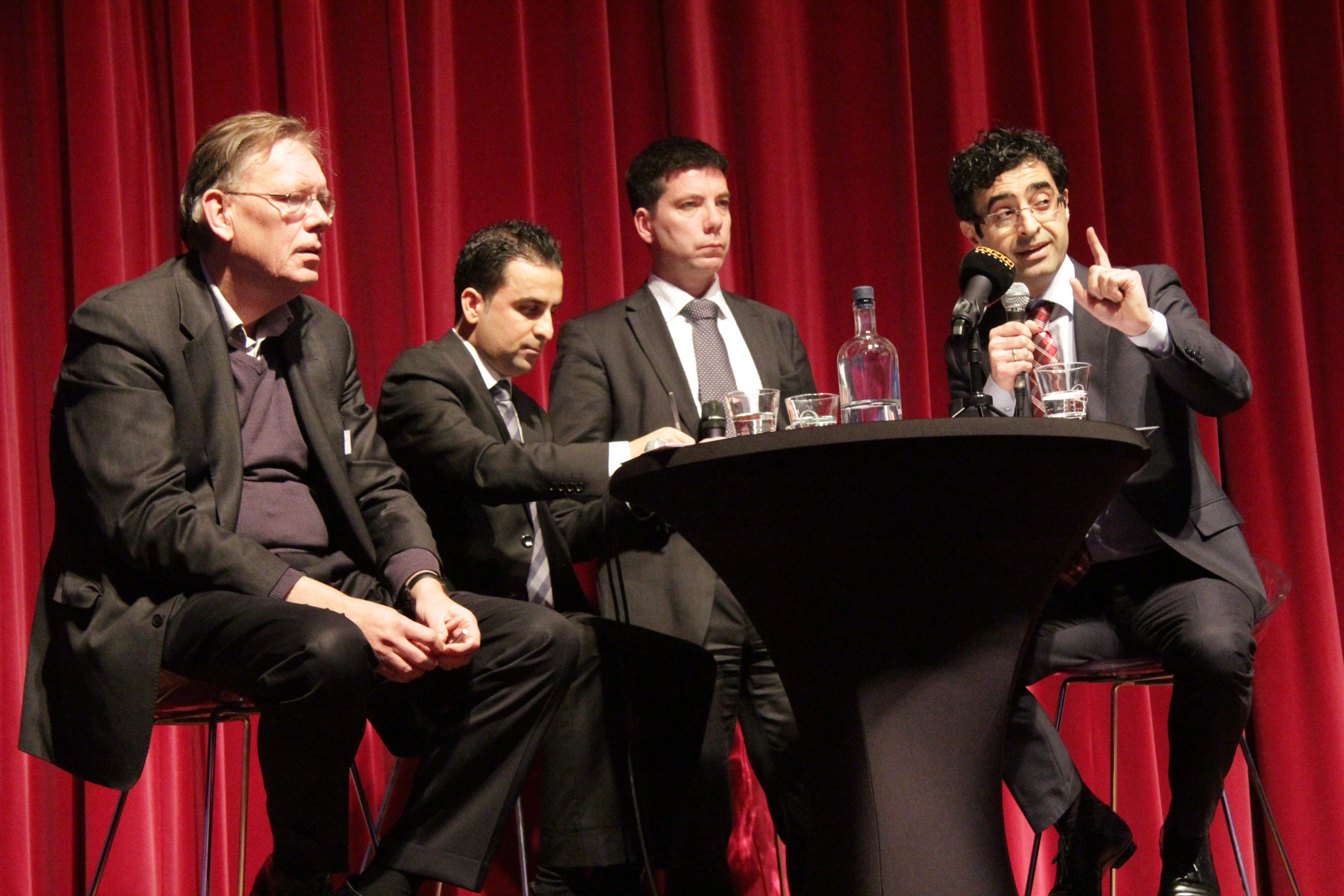 Debat over de toekomst van de Koerden in Irak. Met Jan Marinus Wiersma (Research Fellow WBS), Bachtiar Bakr (PUK), Zana Kurda (regionale regering Kurdistan) en Kawa Hassan (Gorran)